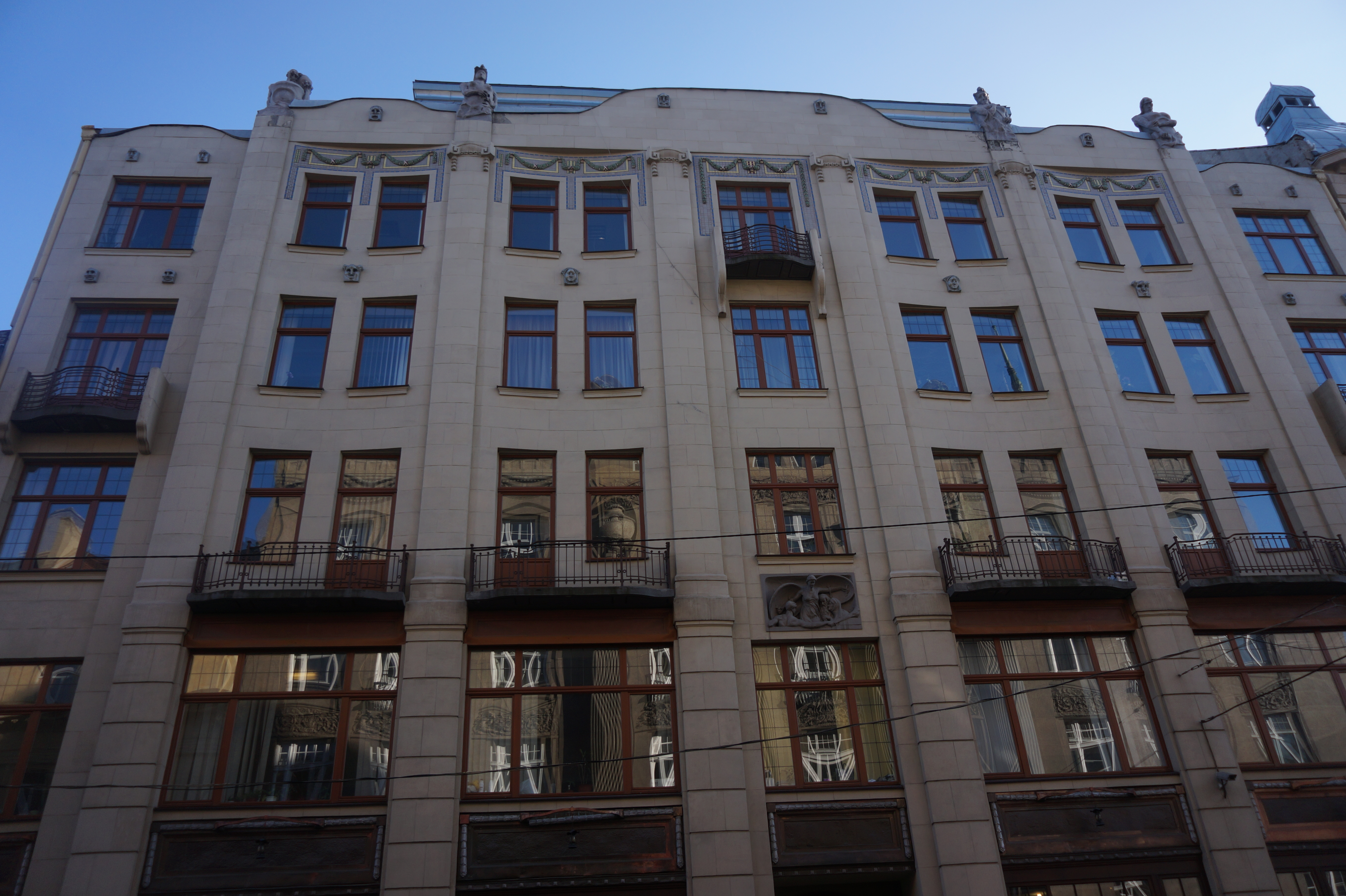 технікум, Львів, Коперника М., 3